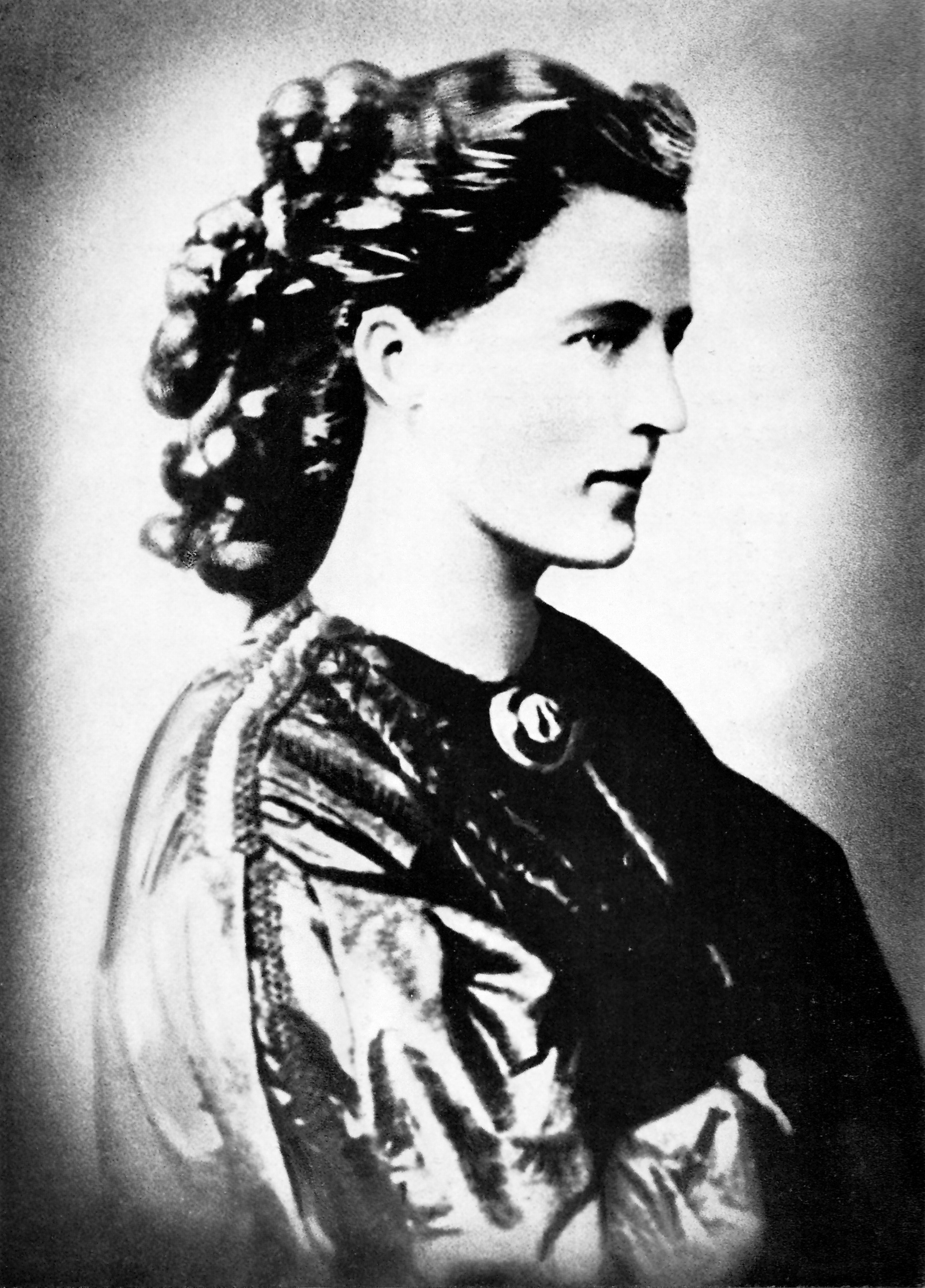 Porträt der Gräfin Sophie von Hatzfeld, nach einer retuschierten Fotografie